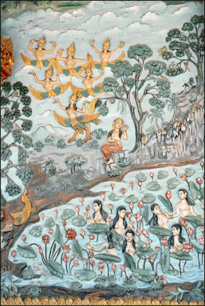 Les kinnari, comme les apsara, sont des divinités secondaires. La partie supérieure de leur corps est celle d'une femme, et la partie inférieure celle d'un oiseau. La légende du Roi Thao Sisouthone et de Nang Manola est représentée sous le porche. Le Vat That doit son nom à un stupa construit par la Reine mère du Roi Sayasetthathirat au milieu du 16ème siècle.